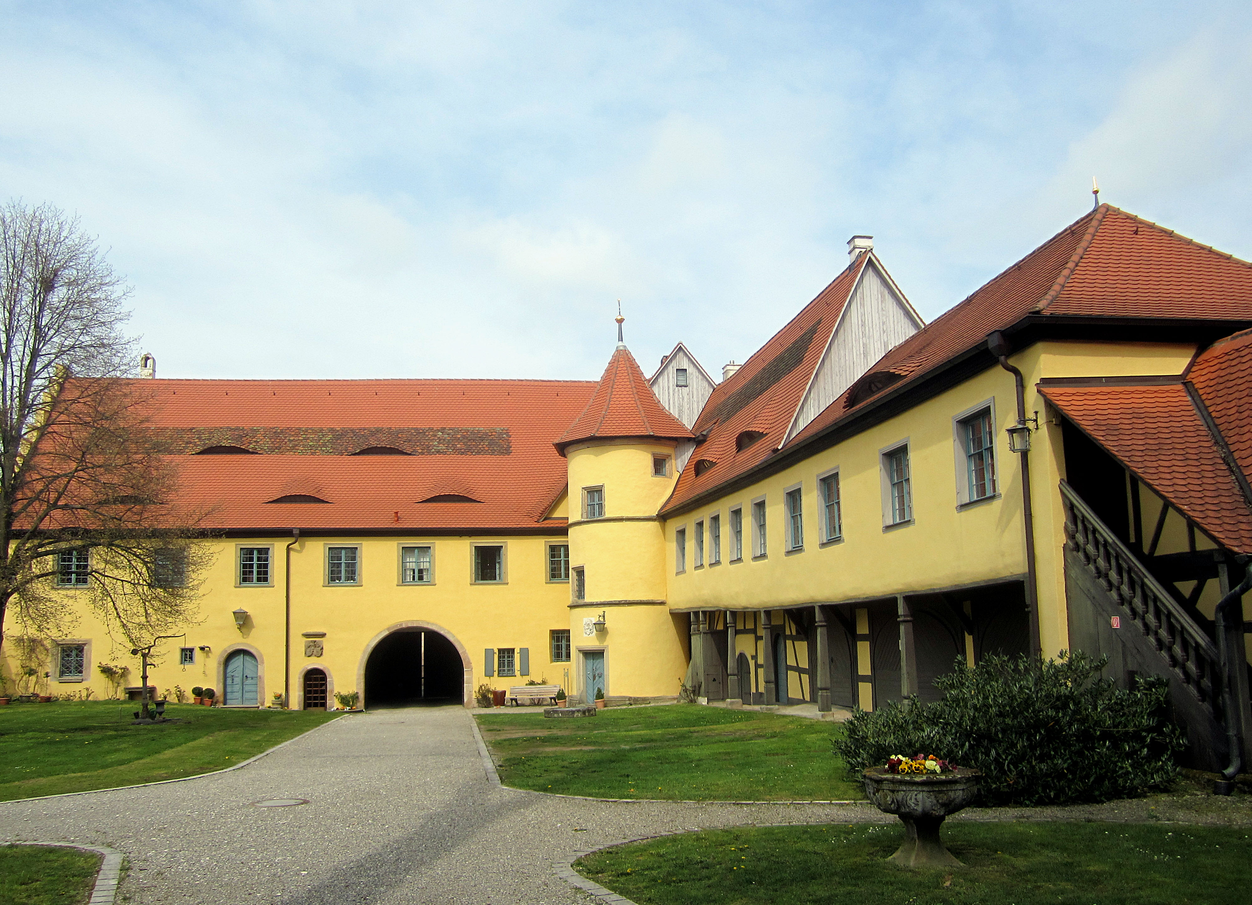 Das Adelsdorfer Schloß im Jahr 2013 von der Hofseite